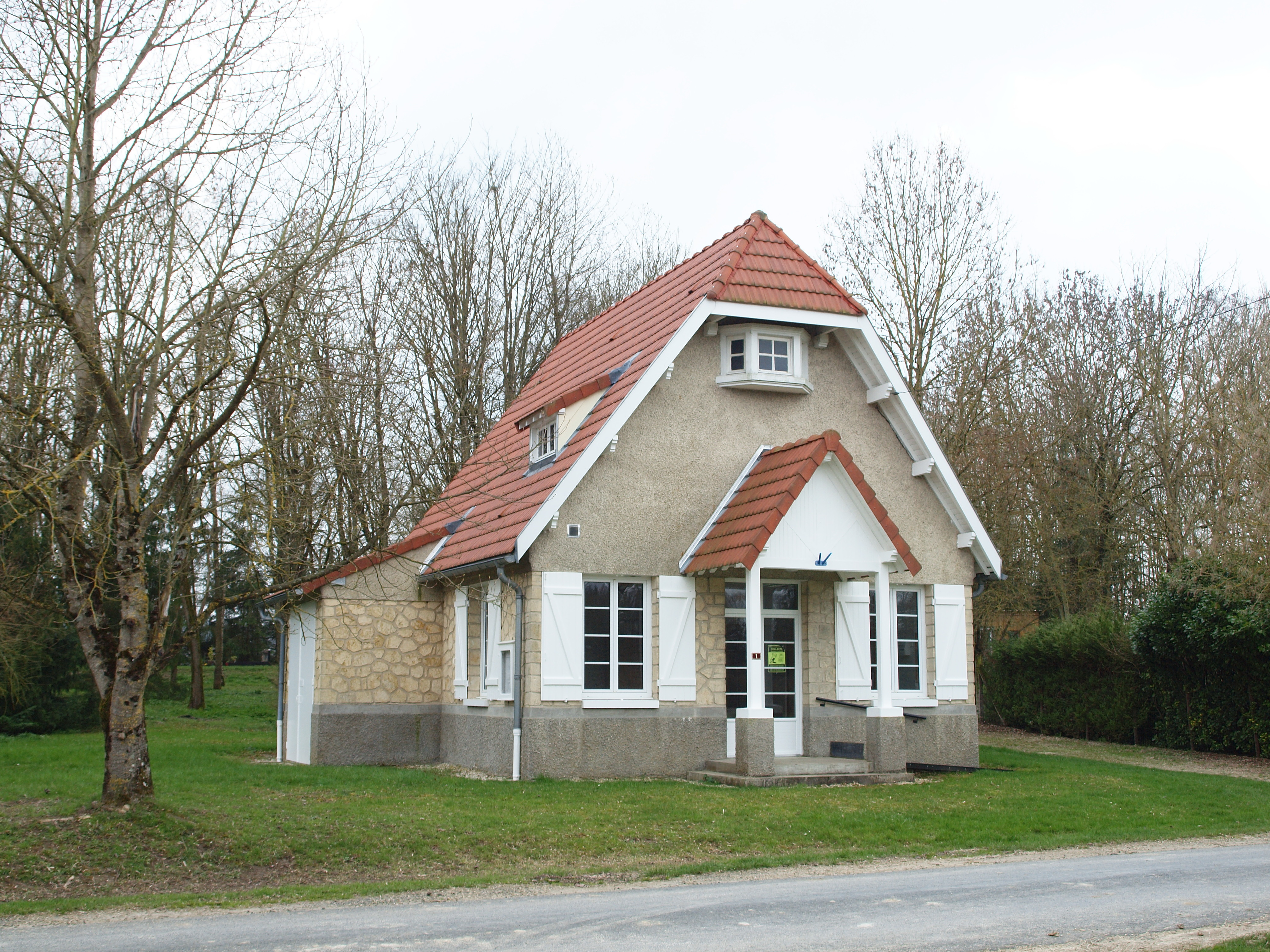 Rouvroy-Ripont (Marne, France)